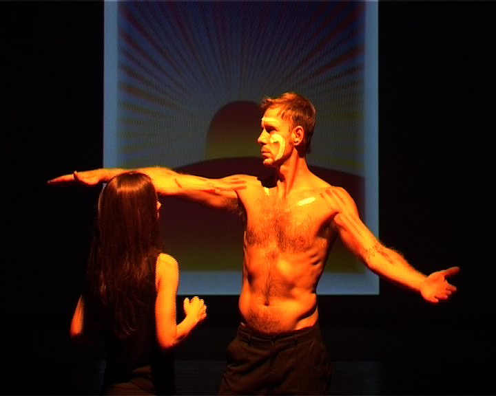 la compagnia de lacost@"I colori del silenzio: Jean Michel Folon"